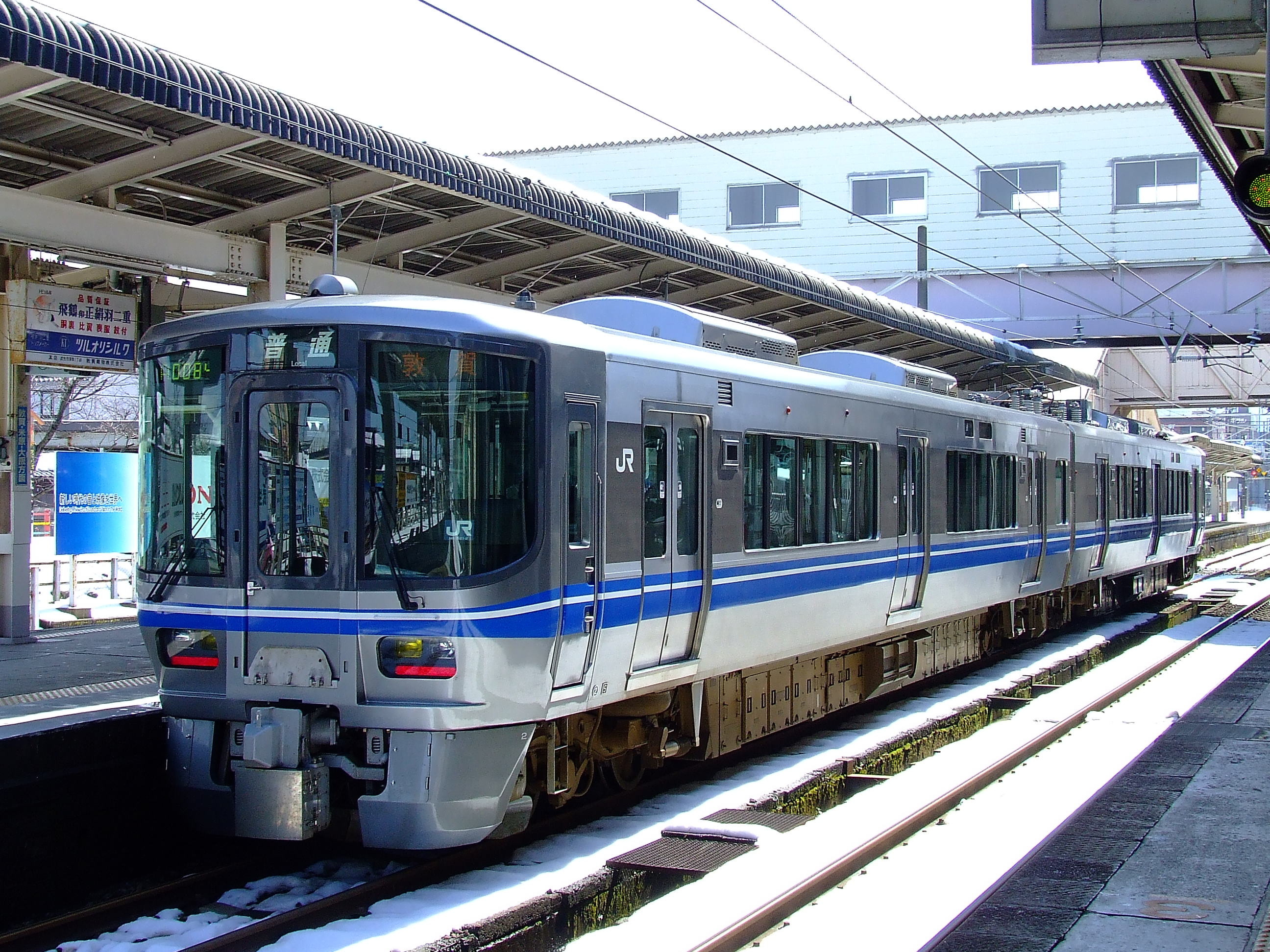 JR西日本521系電車 武生にて